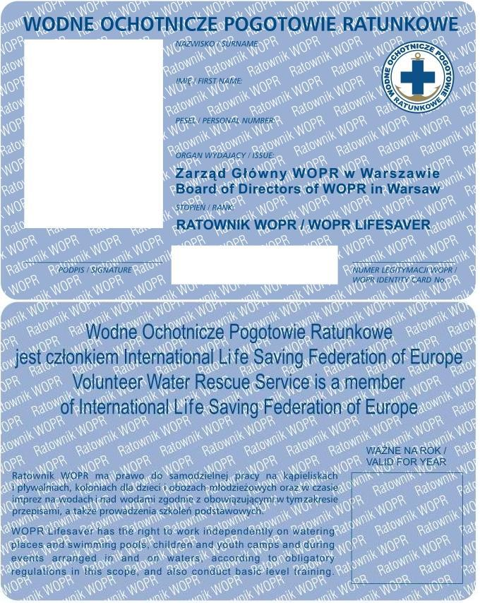 Identyfikator ratownika WOPR